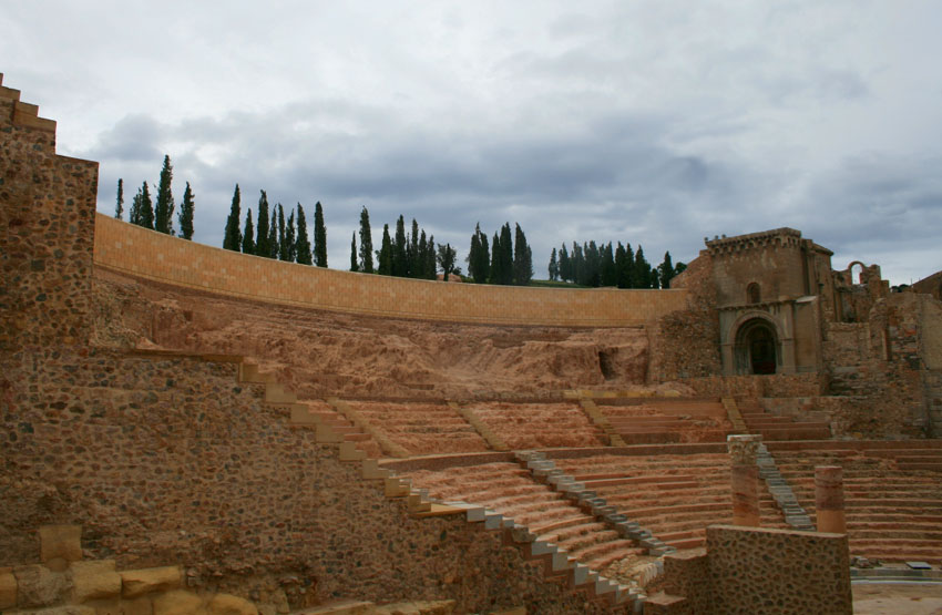 Teatro romano de Cartagena en proceso de restauración.